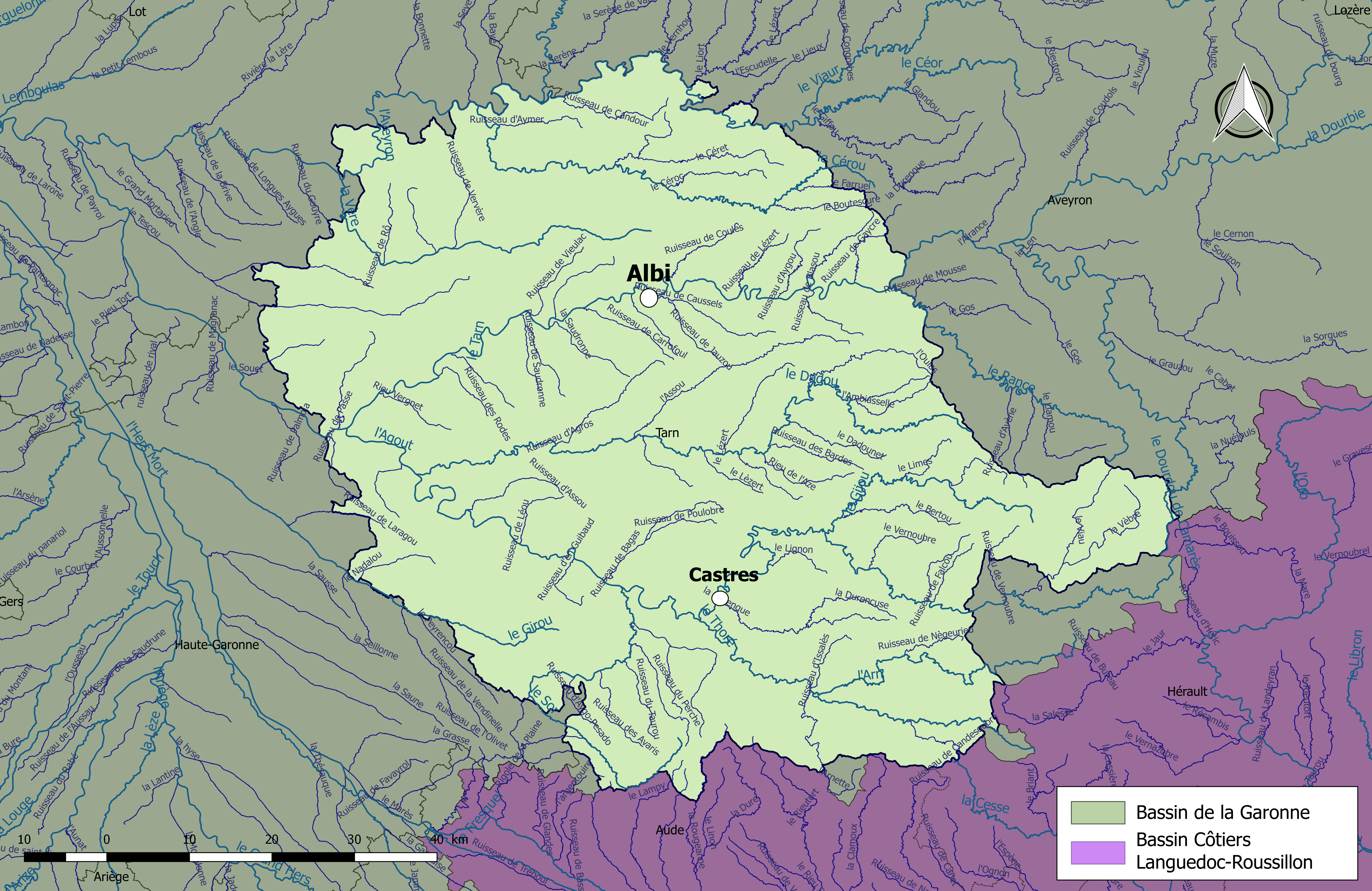 Carte des cours d'eau du département du Tarn (France) de longueur supérieure à 10 km, avec représentation des sous-bassins DCE.